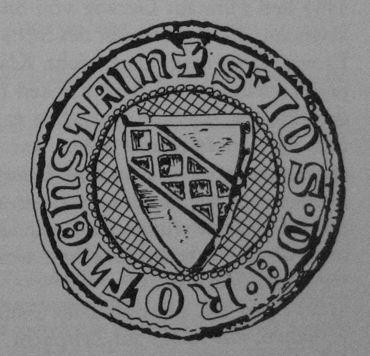 Siegel des Jos von Rothenstein von 1374, Umschrift: S' IOS - DE - ROTENSTAIN